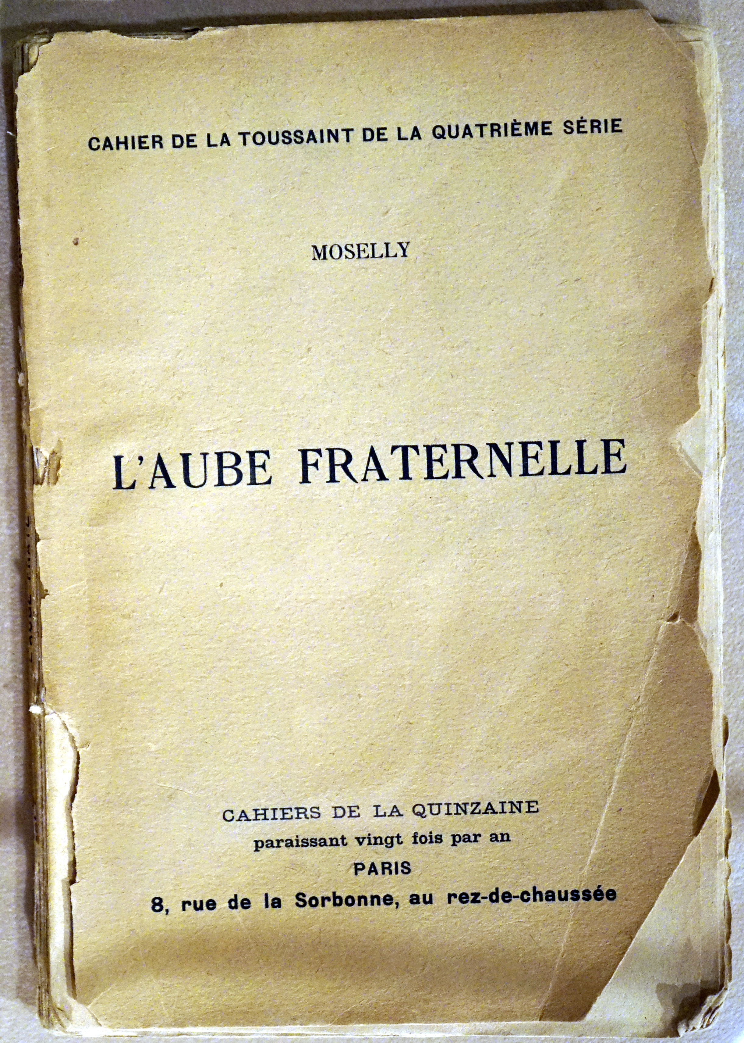 lors de l'exposition au musée de Toul.